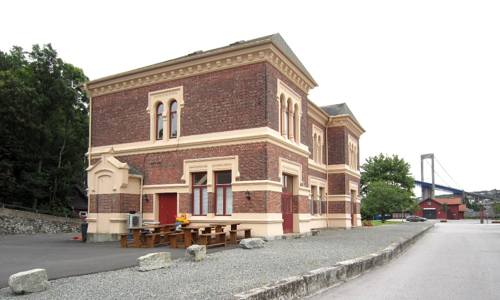 Brevik stasjon